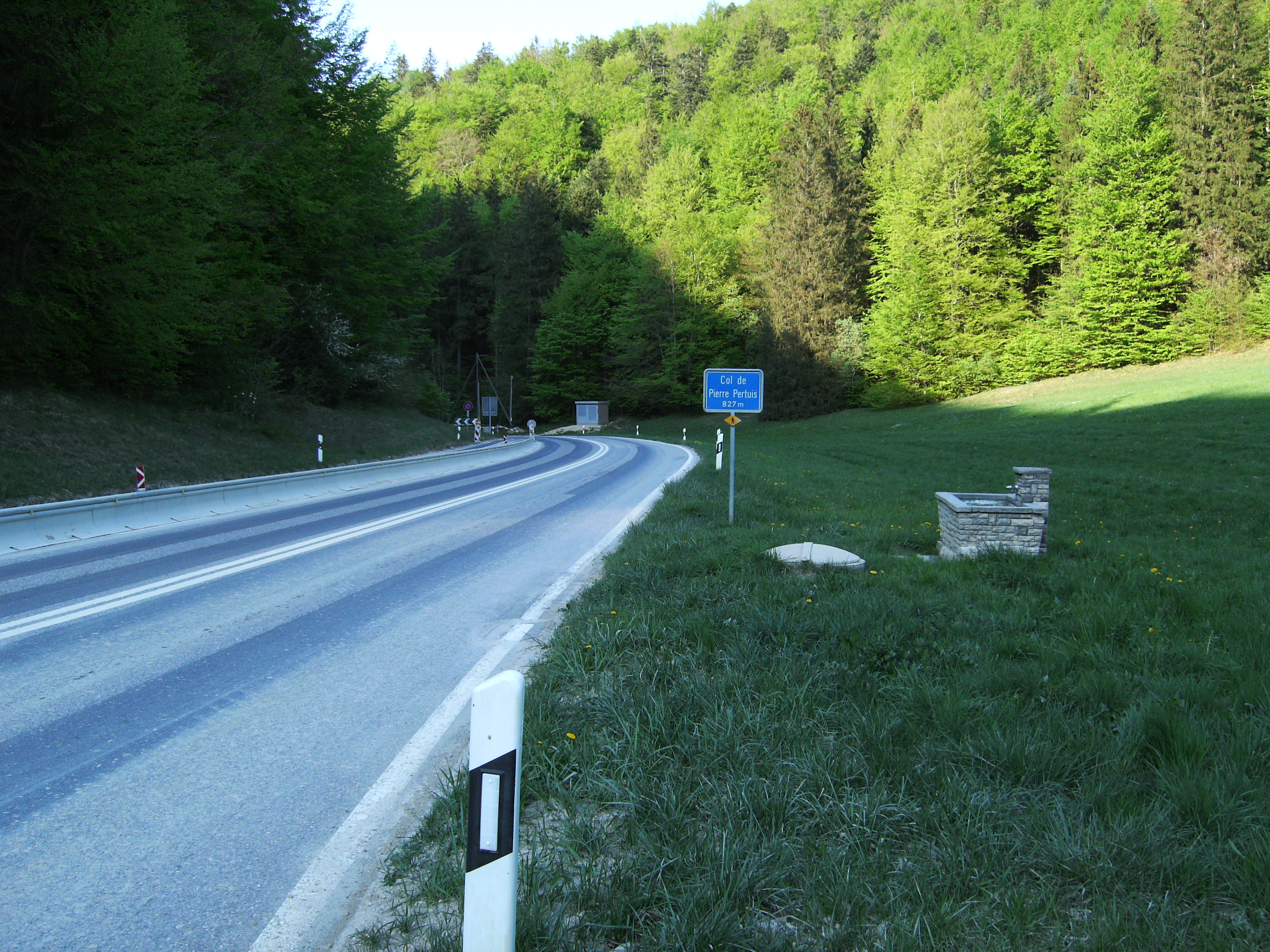 Col de Pierre Pertuis (canton de Berne, Suisse), direction Tavannes